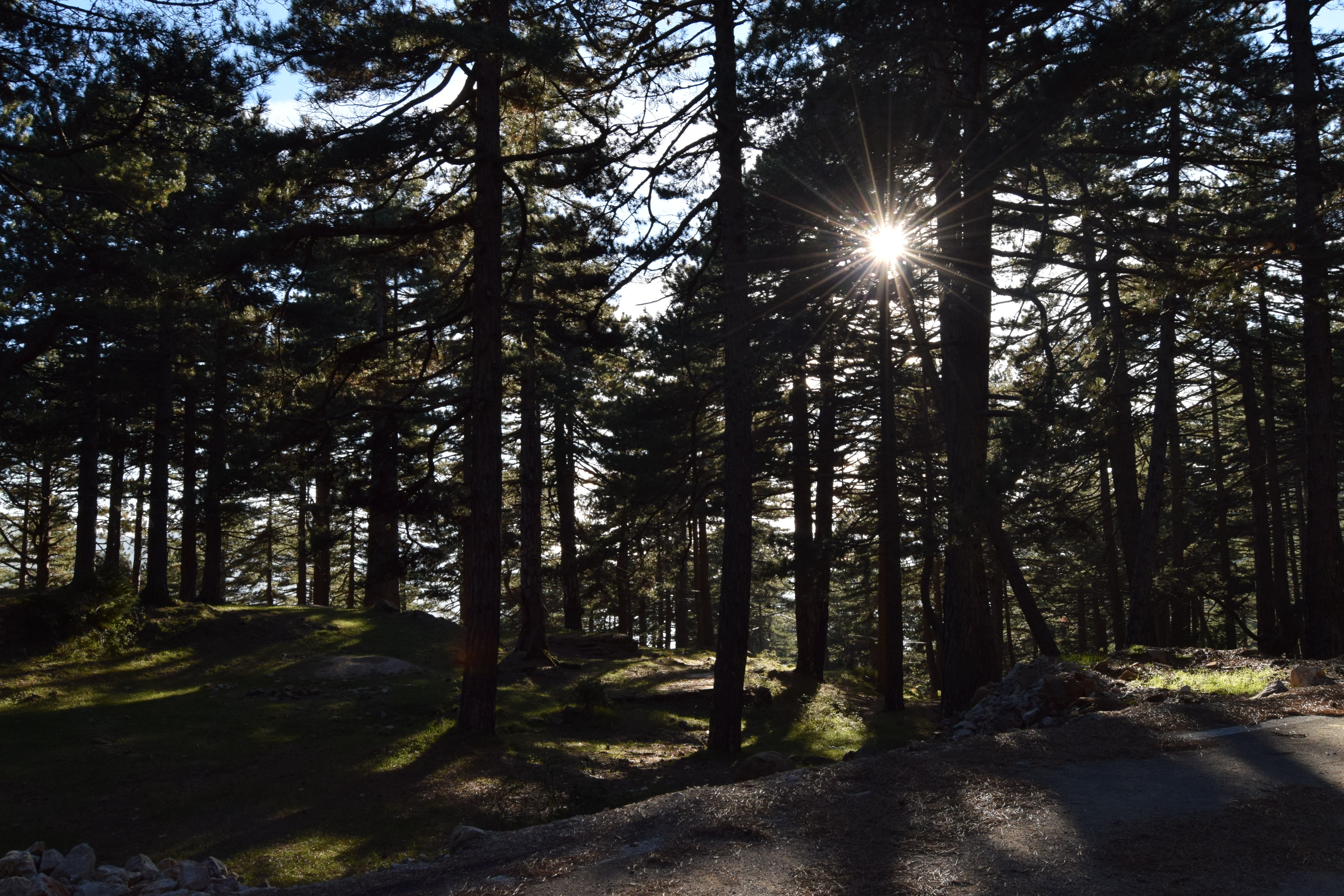 Qafe Shtame, Kruje